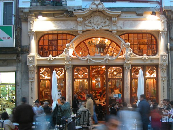 o magestic